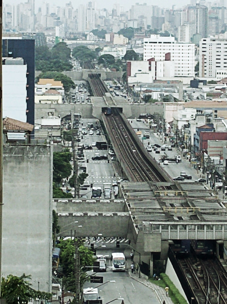 Aspecto do distrito de Santana em São Paulo, Metrô de superfície.